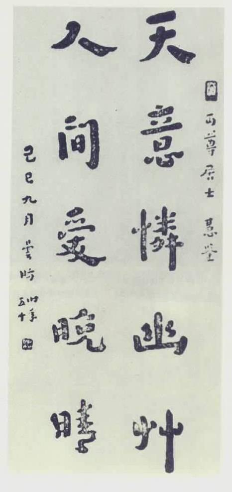 这幅图片来自“中国内江圣水寺圣域佛教图文声像资源网” 并经过我本人的加工（2006年5月9日）。我认为它不会导致版权纠纷，理由如下： 1、它只是一幅书法作品图象 2、分辨率很低，不足以反映书法作品的原貌 3、书法作品的作者是一位公众人物，且已已故去多年